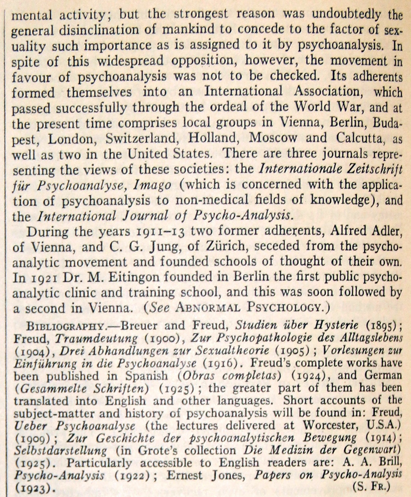 Extrait de l'article « Psychoanalysis », dû à S. Freud, dans la Britannica, 14e édition, 1929.